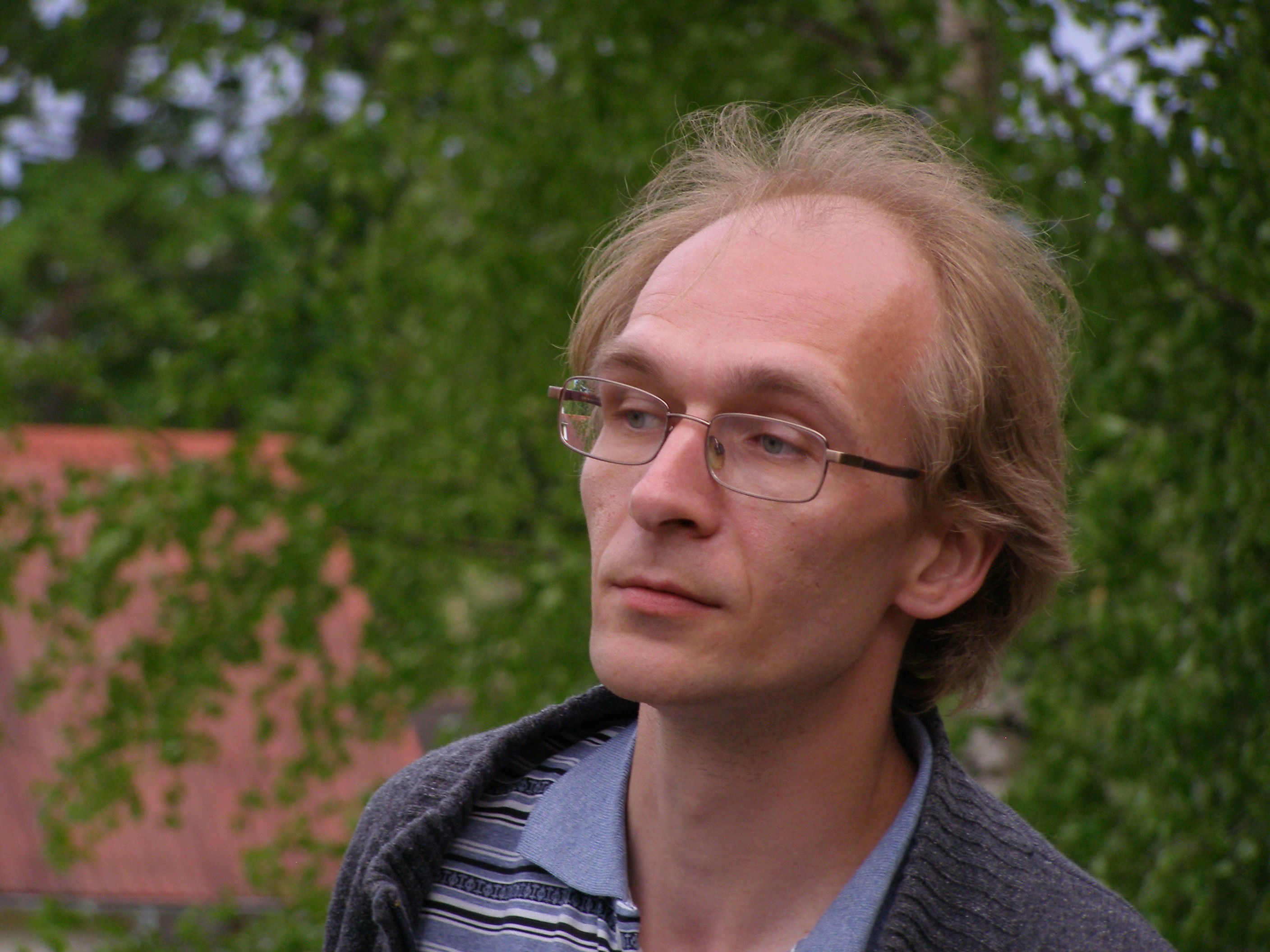 Ingmar Tulva